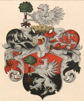 Anhorn von Hartwissi suguvõsa aadlivapp.